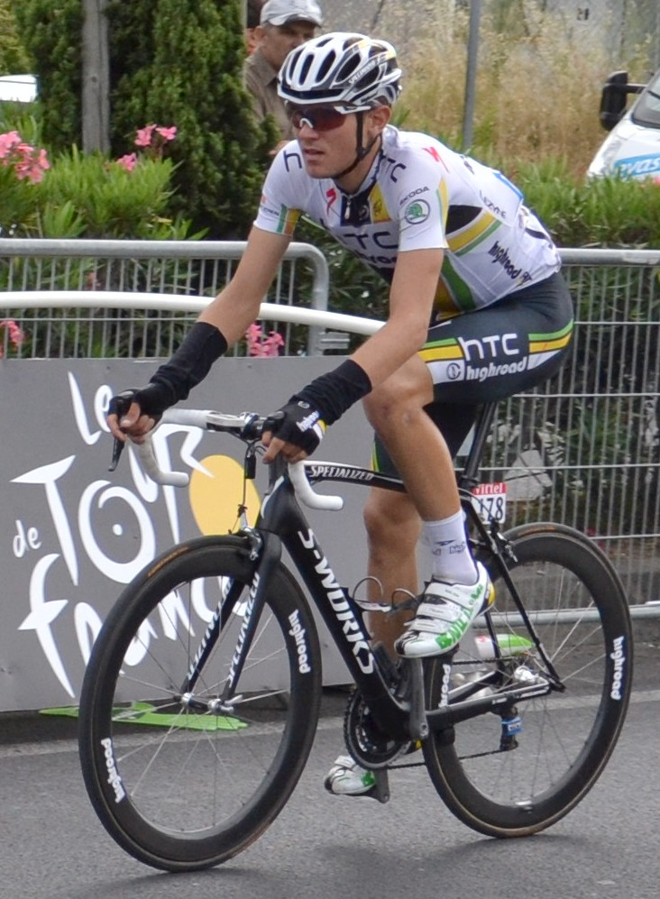 Tejay van Garderen lors de la 15e étape du Tour de France 2011.